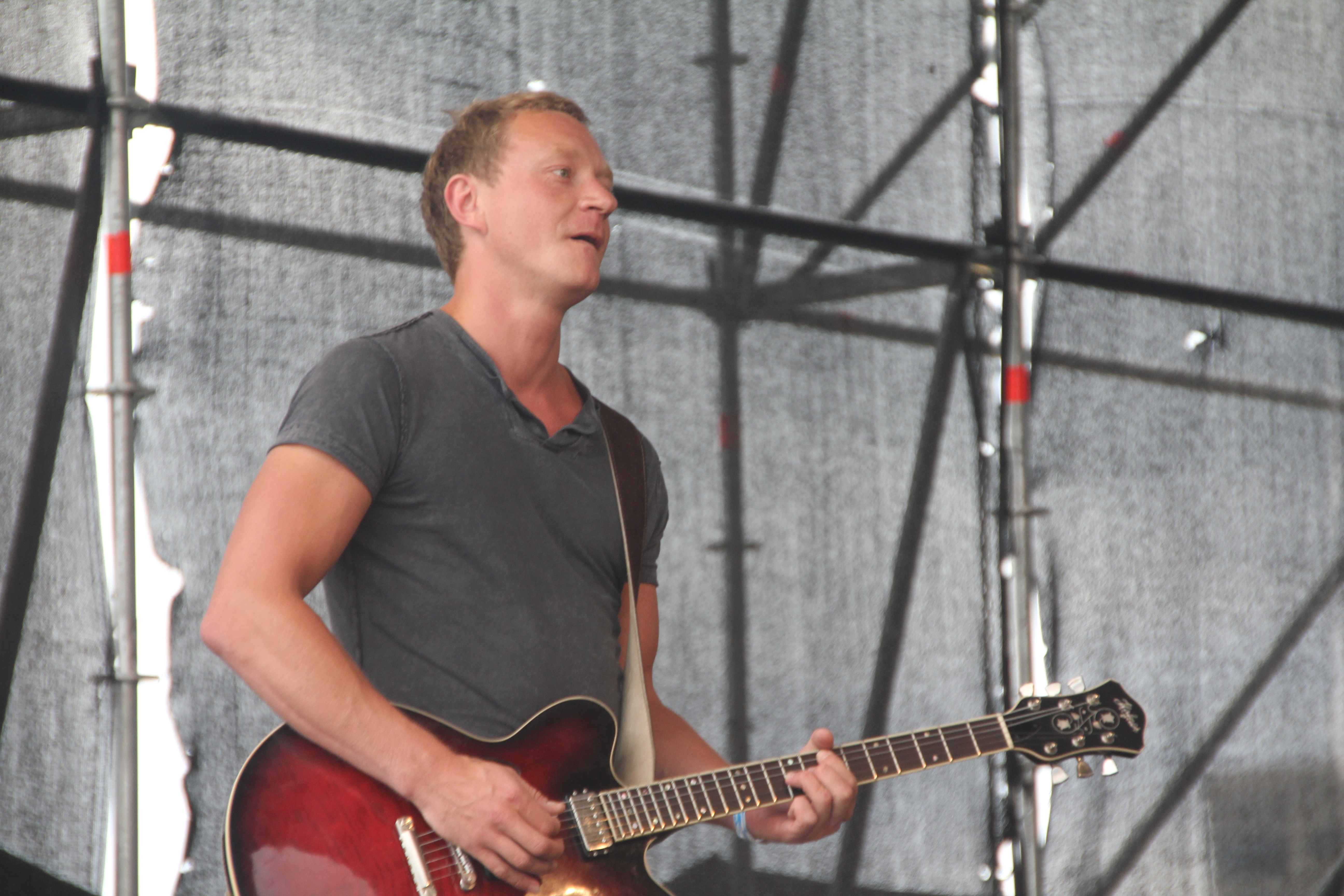 Kiur Aarma esinemas koos ansambliga Lenna Tallinna Merepäevadel.